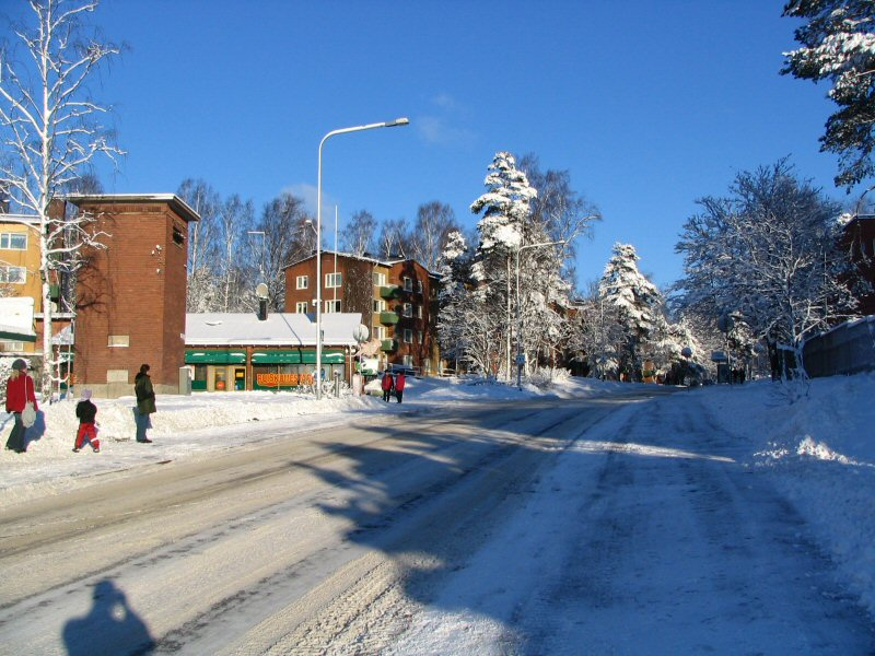 Roihuvuorentie Roihuvuoressa